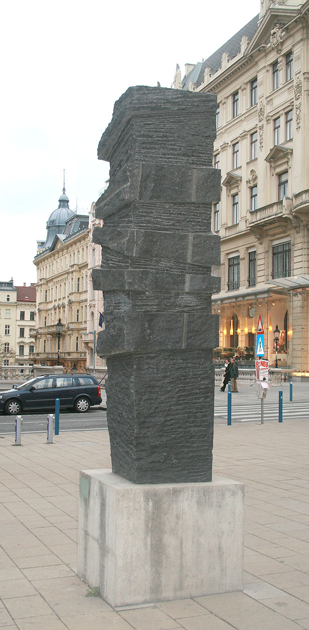 Marcus Omofuma Stein, Ulrike Truger - 2003, Mariahilferstrasse/Wien